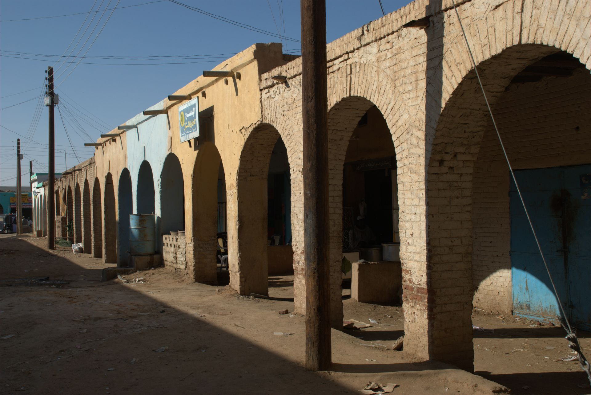 Market square in Karima, Sudan.